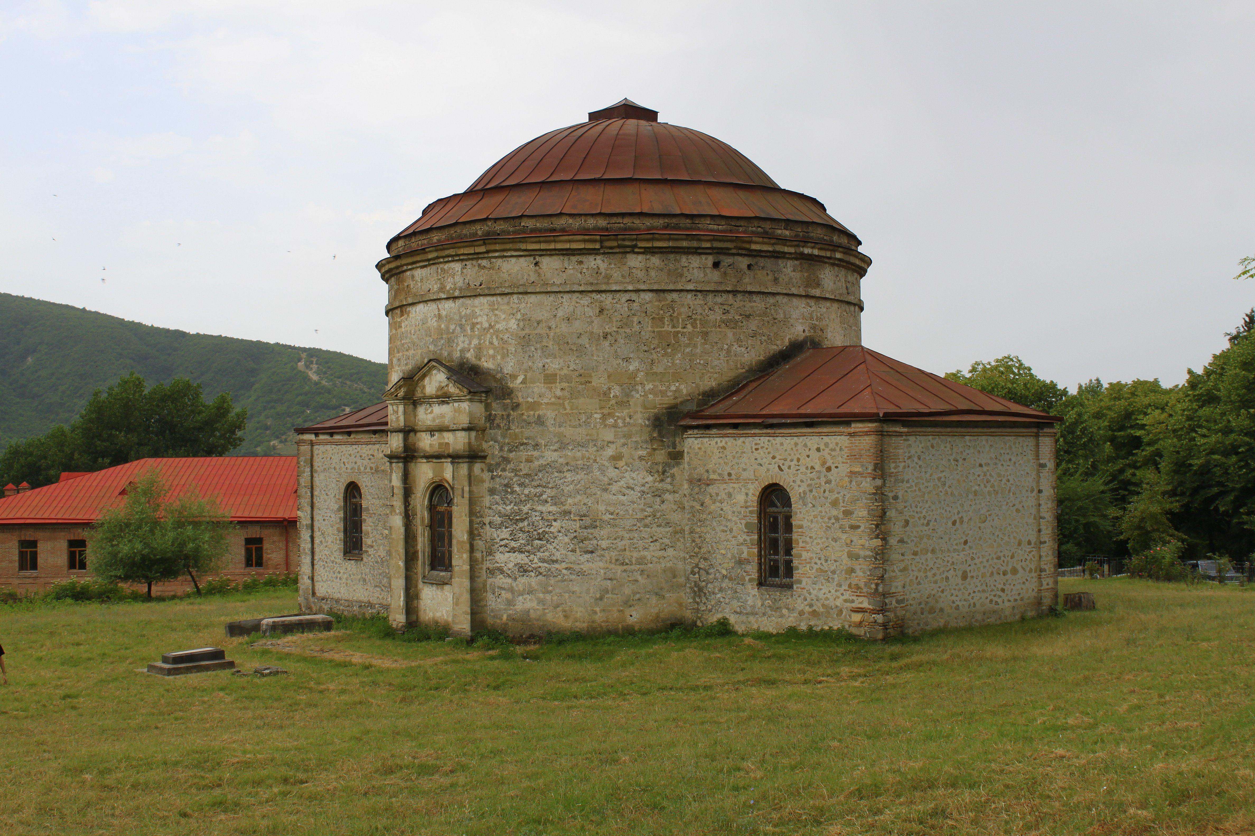 Музей народно-прикладного искусства.